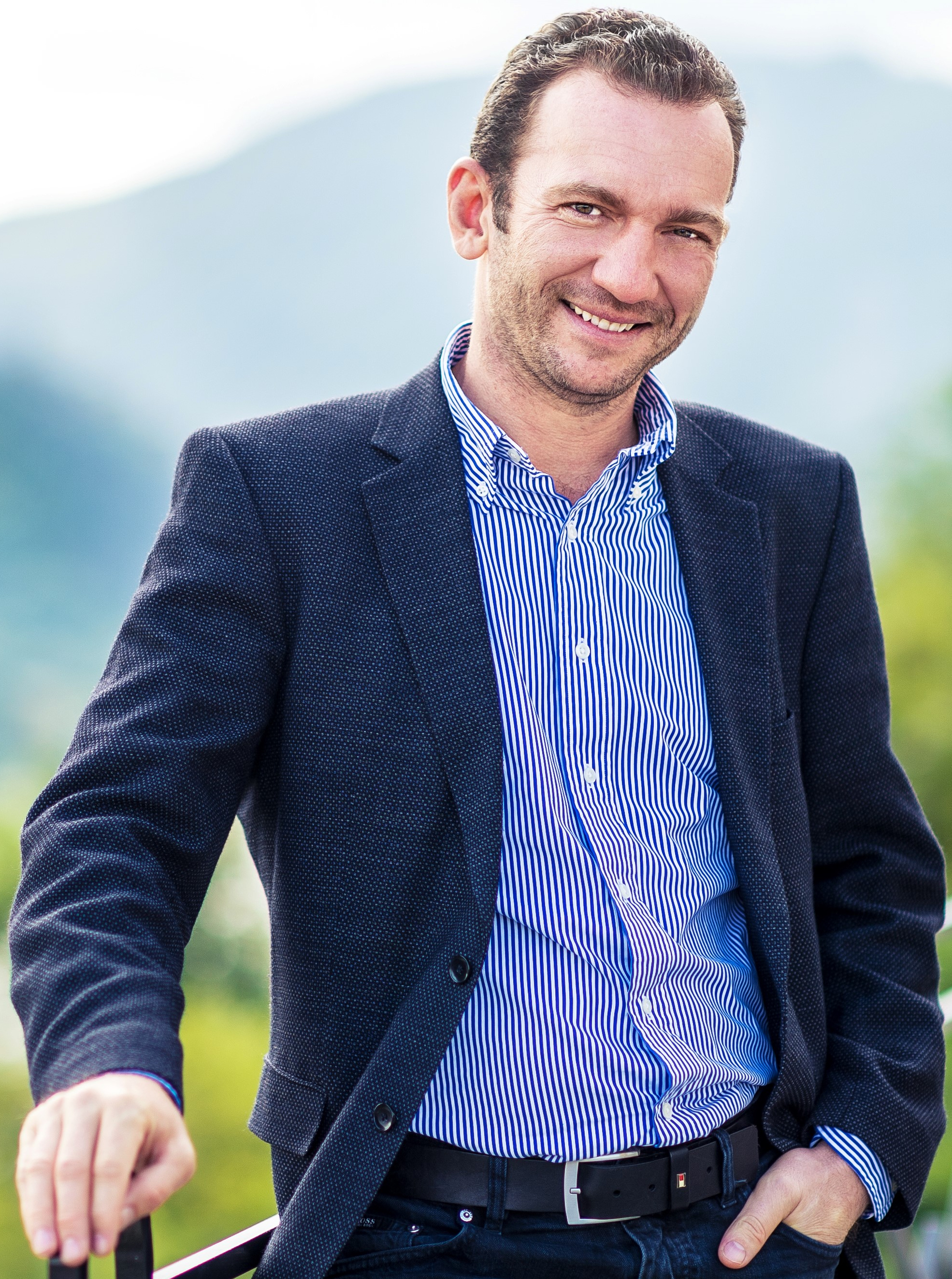 Portrét Aleše Grafa, jediného akcionáře Centropol Energy, a.s.